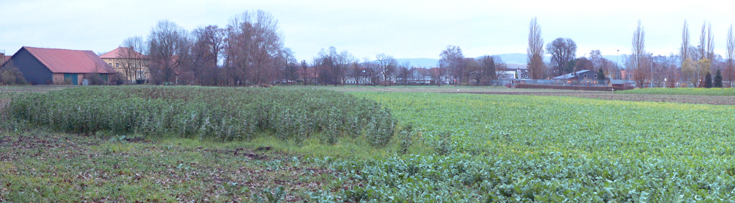 Im Vordergrund früherer Schlosspark von Schloss Salzdahlum